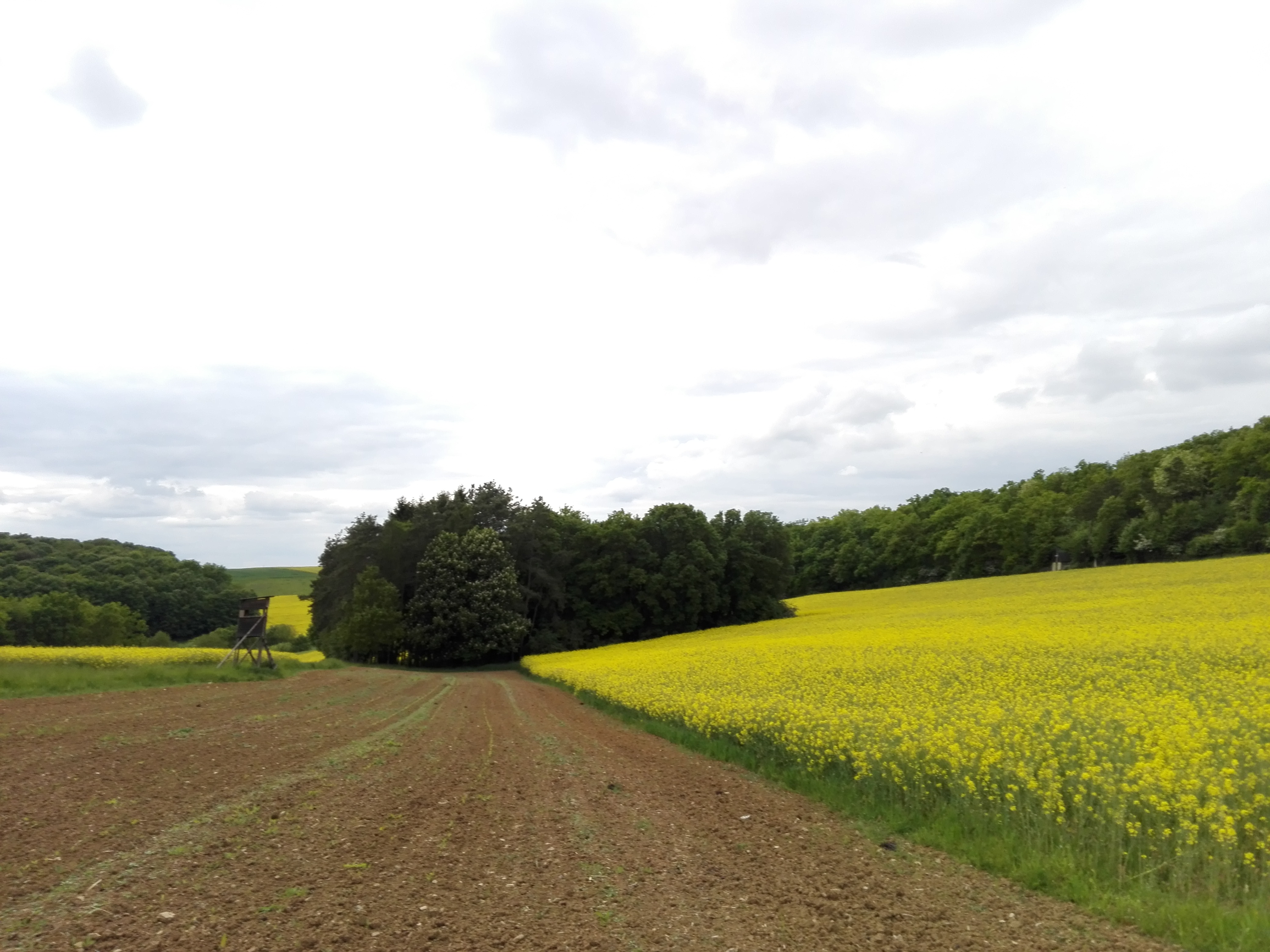 This picture was taken on the route "Durchs Lauerbachtal ", which I find in the book "Schweinfurt 360", where suggested about 20 tours for Schweinfurt region. Dittelbrunn in Bavaria (Germany)